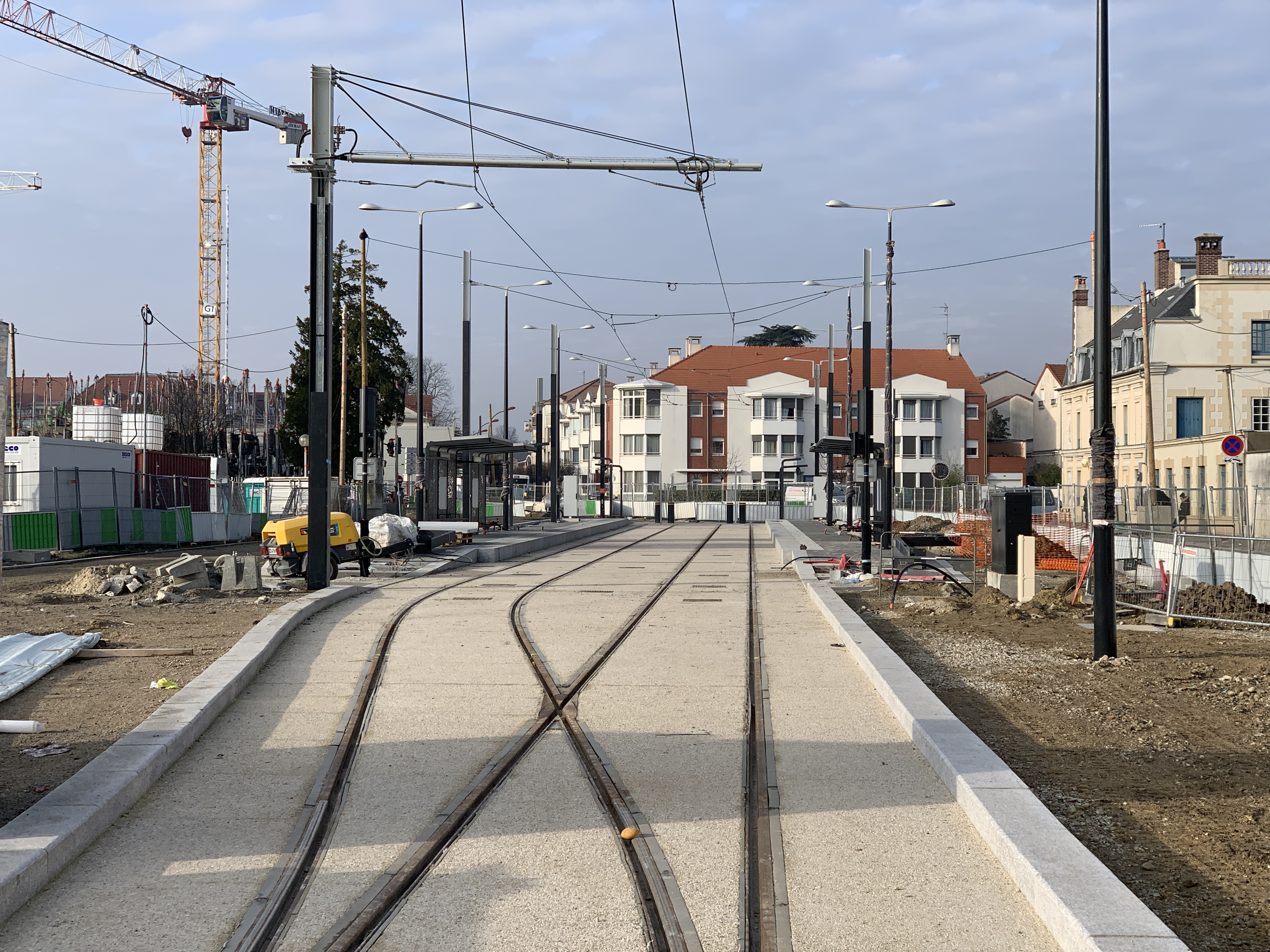 Station de tramway Hôpital de Montfermeil de la ligne 4 du tramway d'Île-de-France, Montfermeil.